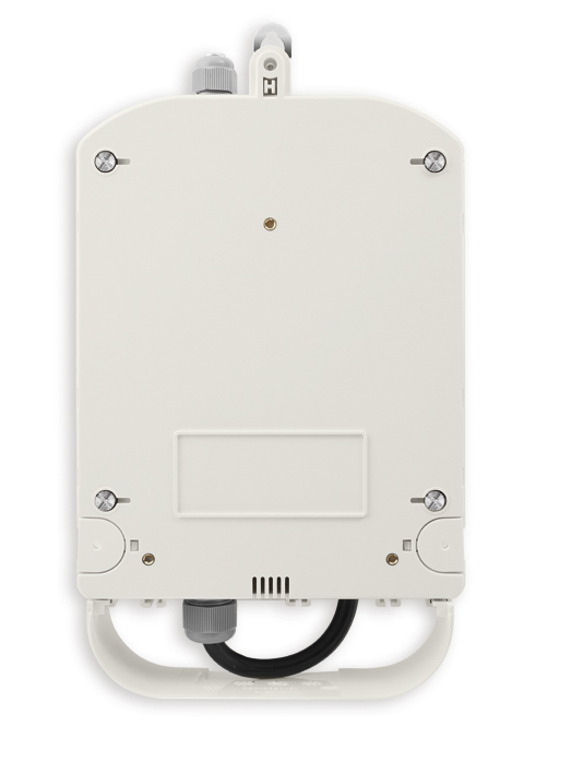 Datenkonzentrator